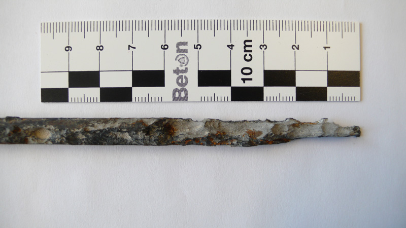 Lochkorrosion infolge Chlorideinwirkung